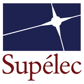 LOGO ÉCOLE SUPÉRIEURE D'ÉLECTRICITÉ